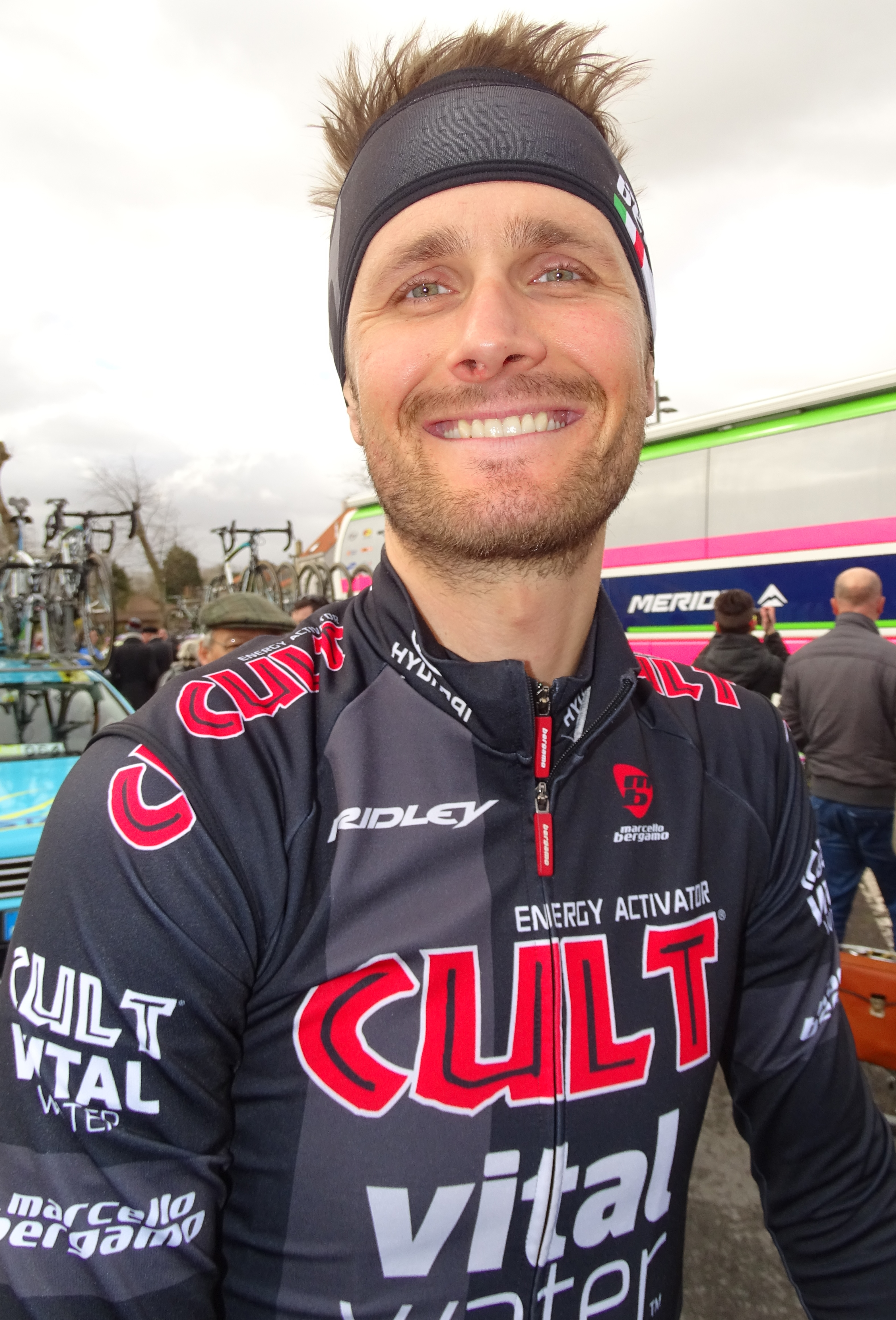 Reportage réalisé le mardi 31 mars à l'occasion de du départ de la première étape des Trois jours de La Panne 2015 à La Panne, Belgique.